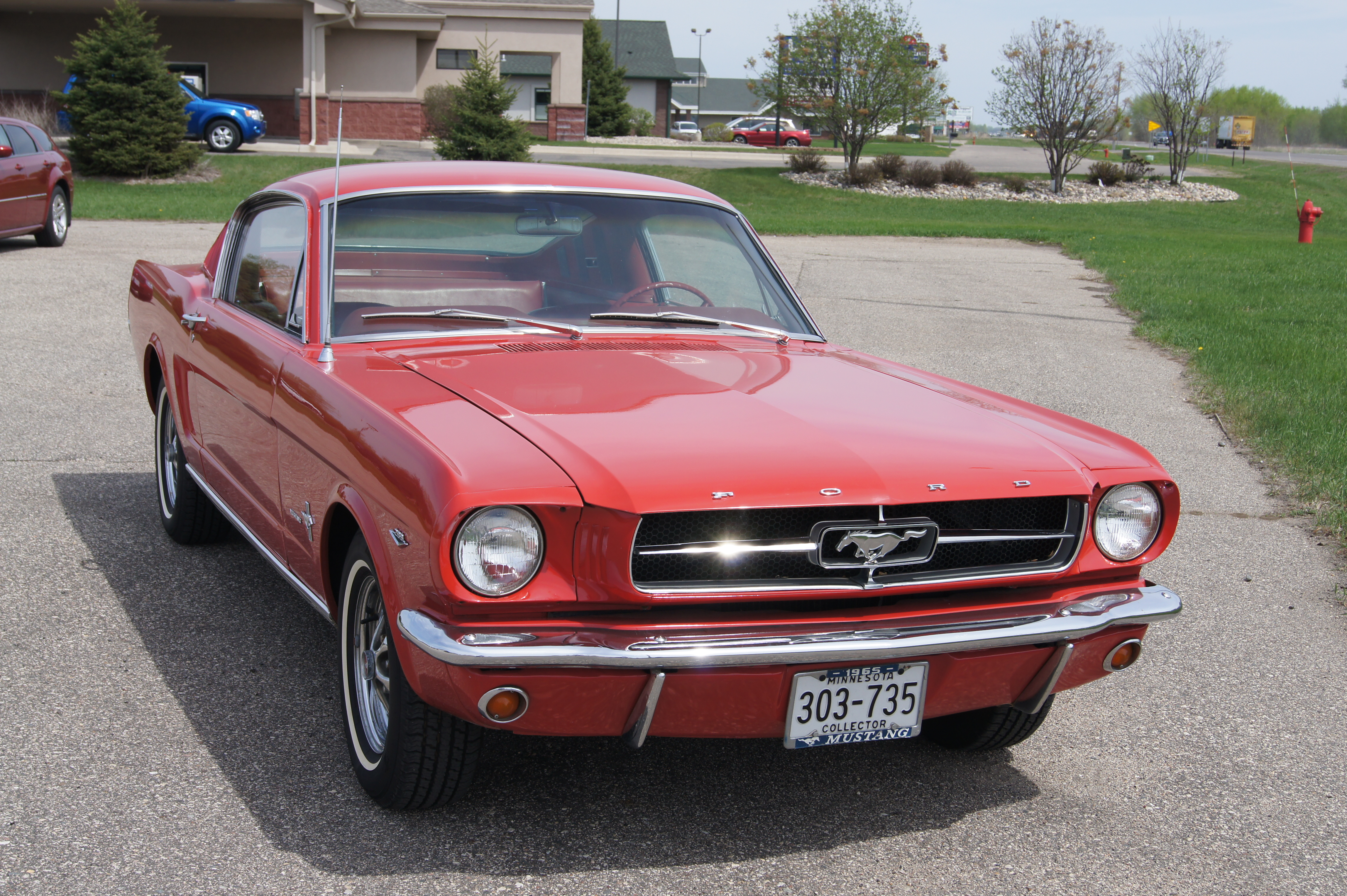 65 Ford Mustang 2+2